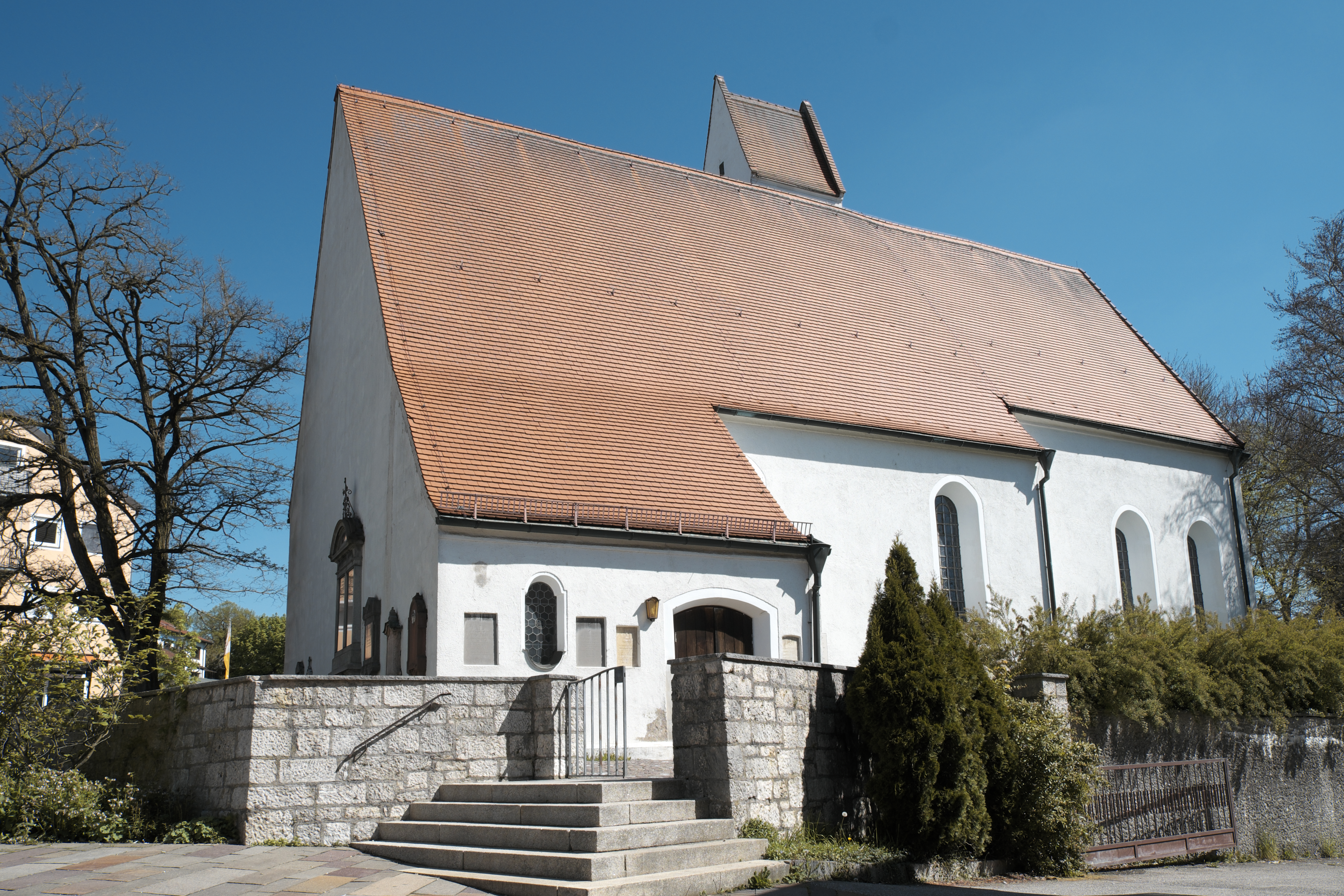 Katholische Filialkirche Unsere Liebe Frau in Gauting im Landkreis Starnberg (Bayern, Deutschland)